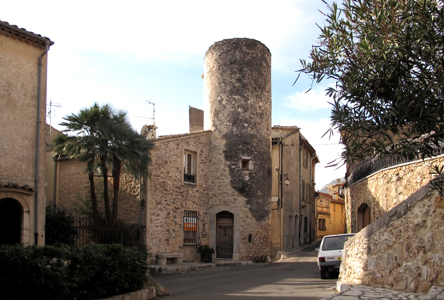 Saint-Jeannet. Alpes-Maritimes, France